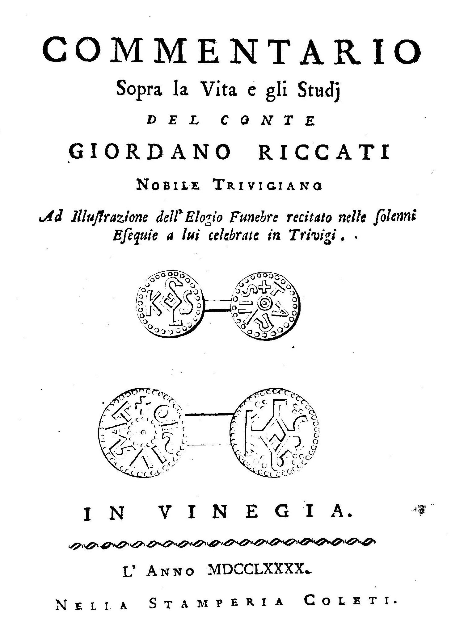 Commentario sopra la vita e gli studj del conte Giordano Riccati nobile trivigiano ad illustrazione dell'elogio funebre recitato nelle solenni esequie a lui celebrate in Trivigi. - In Vinegia : nella Stamperia Coleti, 1790. - 8, 134, [2] p. ; 4º .